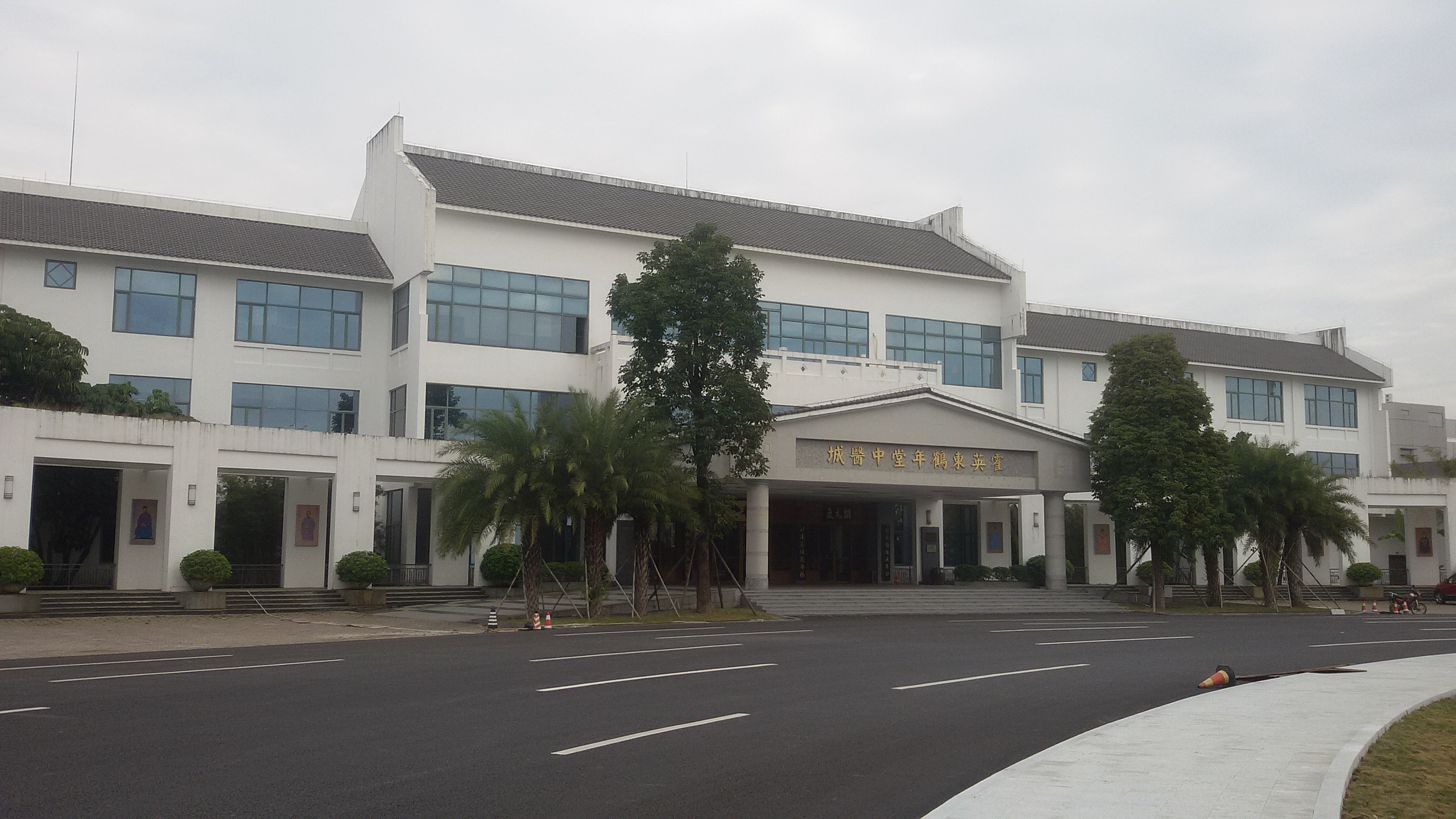 粵語: 霍英東鶴年堂中醫城